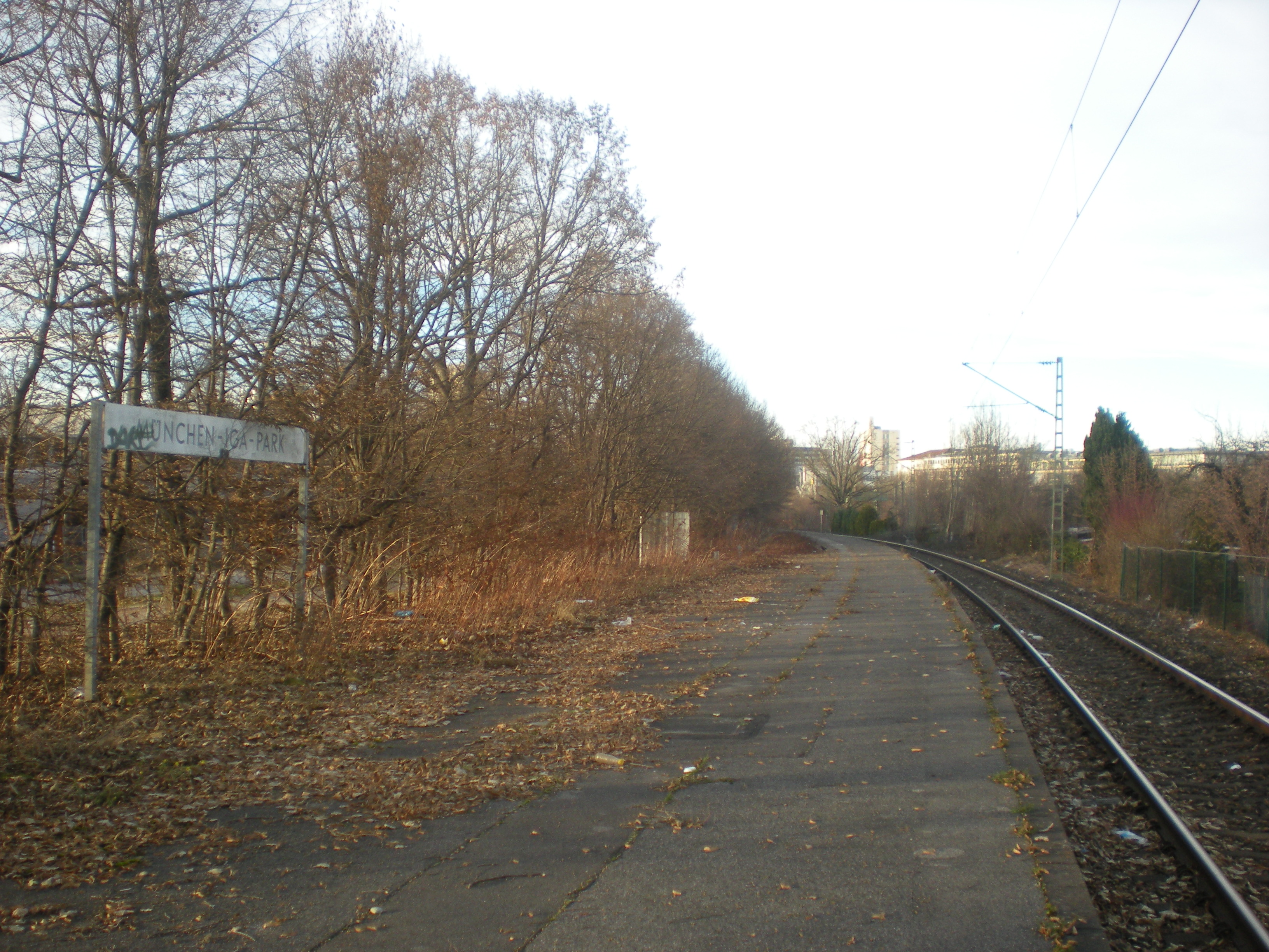 Seitenbahnsteig des stillgelegten Haltepunkts München IGA-Park (2012)